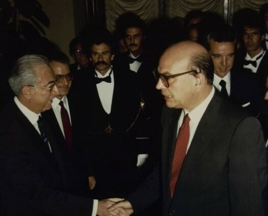 Bettino Craxi saluta il neo eletto Presidente della Repubblica Francesco Cossiga